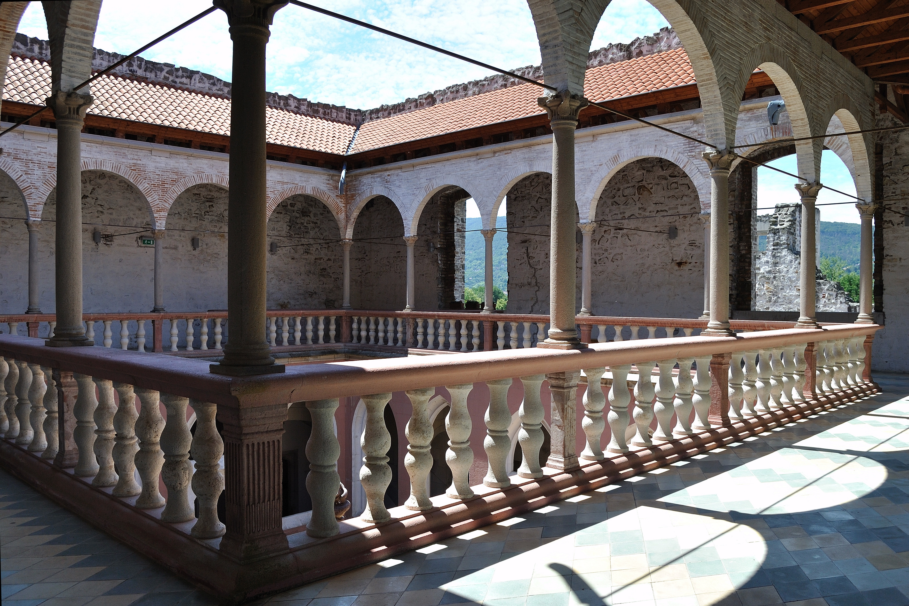 a királyi palota teljes romterülete This is a photo of a monument in Hungary. Identifier: 91325